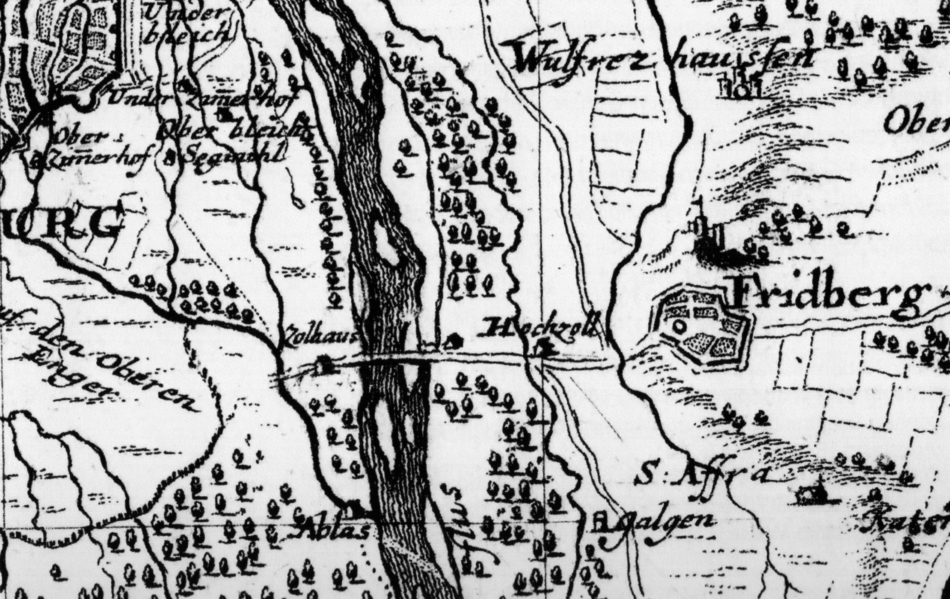 Ausschnitt aus einem Kupferstich von Johann Stridbeck, der den Bereich zwischen Augsburg und Friedberg zeigt. Zu sehen ist der Lech, der Ablass vom Lech, die Brücke über den Lech mit dem Zollhaus am linken Lechufer und dem Hochzoll an der Weggabelung nach Friedberg und St. Afra. Im Norden Wulfertshausen. Im Süden ein Galgen.